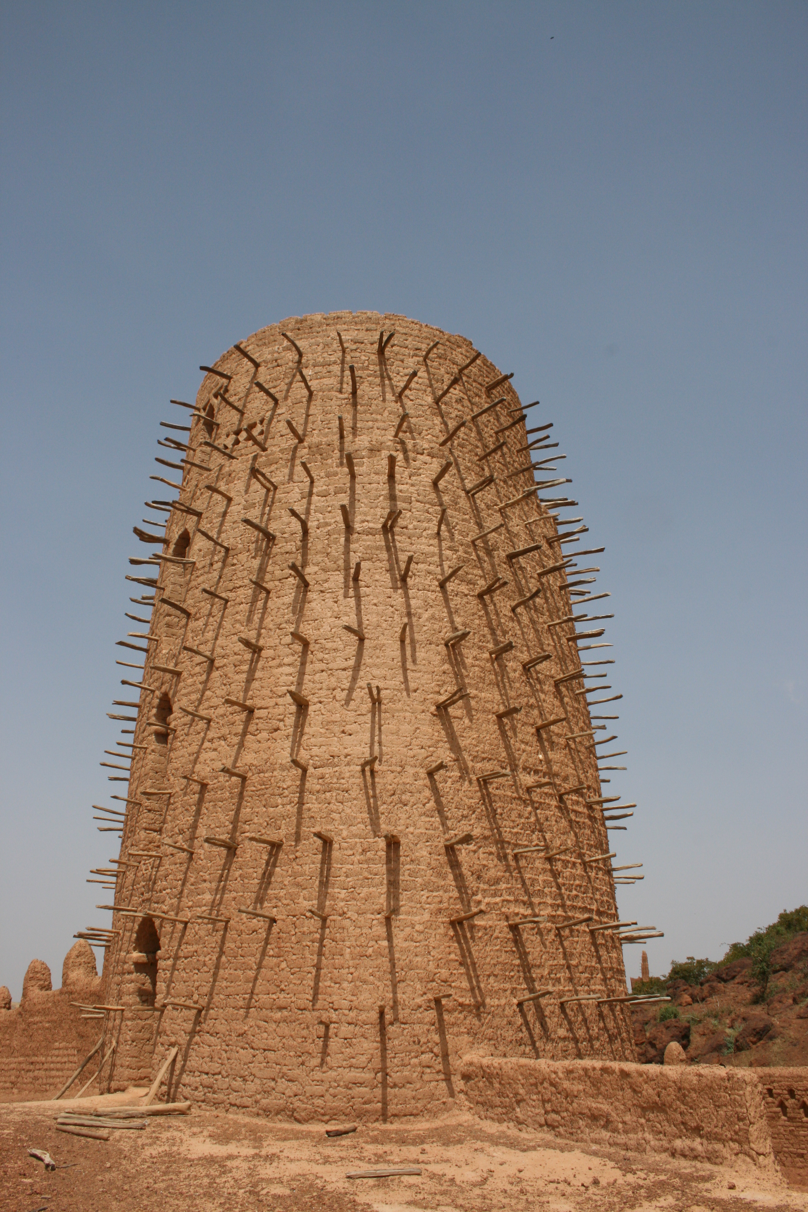 Veduta della moschea di Bani - Burkina Faso